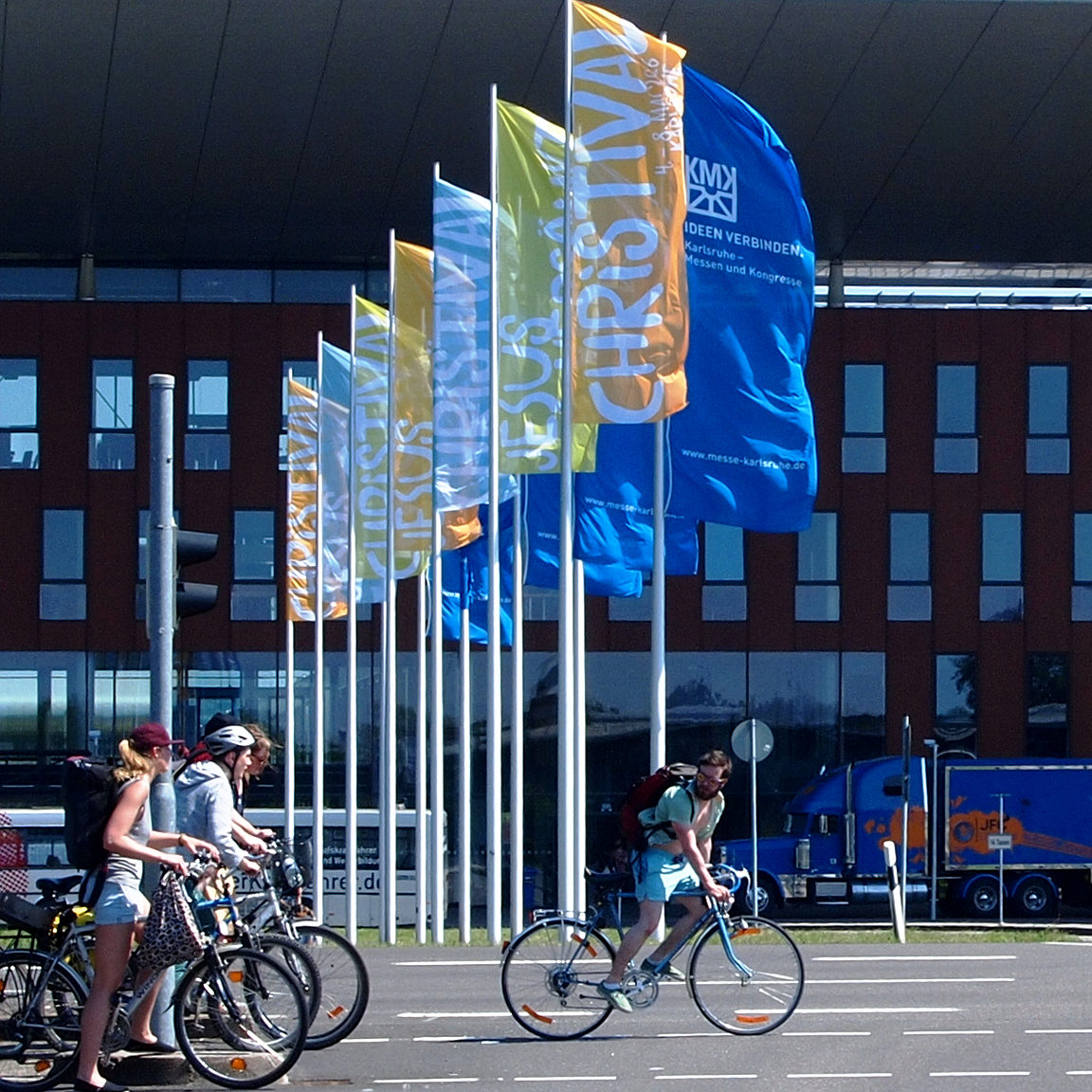 Christival 2016 Jesus versöhnt KMK Ideen verbinden